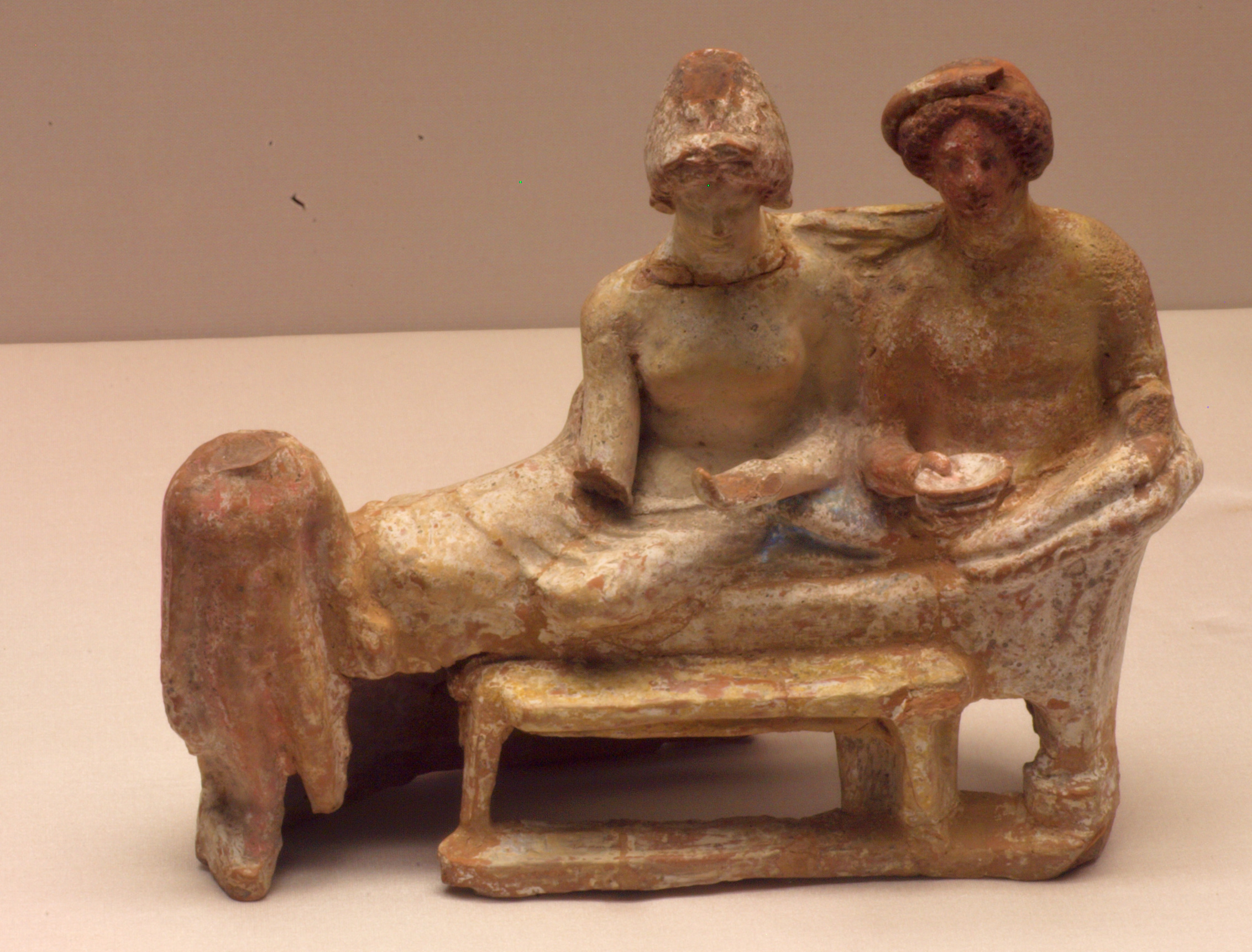 Terrakottagruppe mit einer Hetäre und einem Jüngling beim Symposium. Beide mit bloßem Oberkörper, neben ihnen ein nackter Sklavenjunge als Mundschenk.